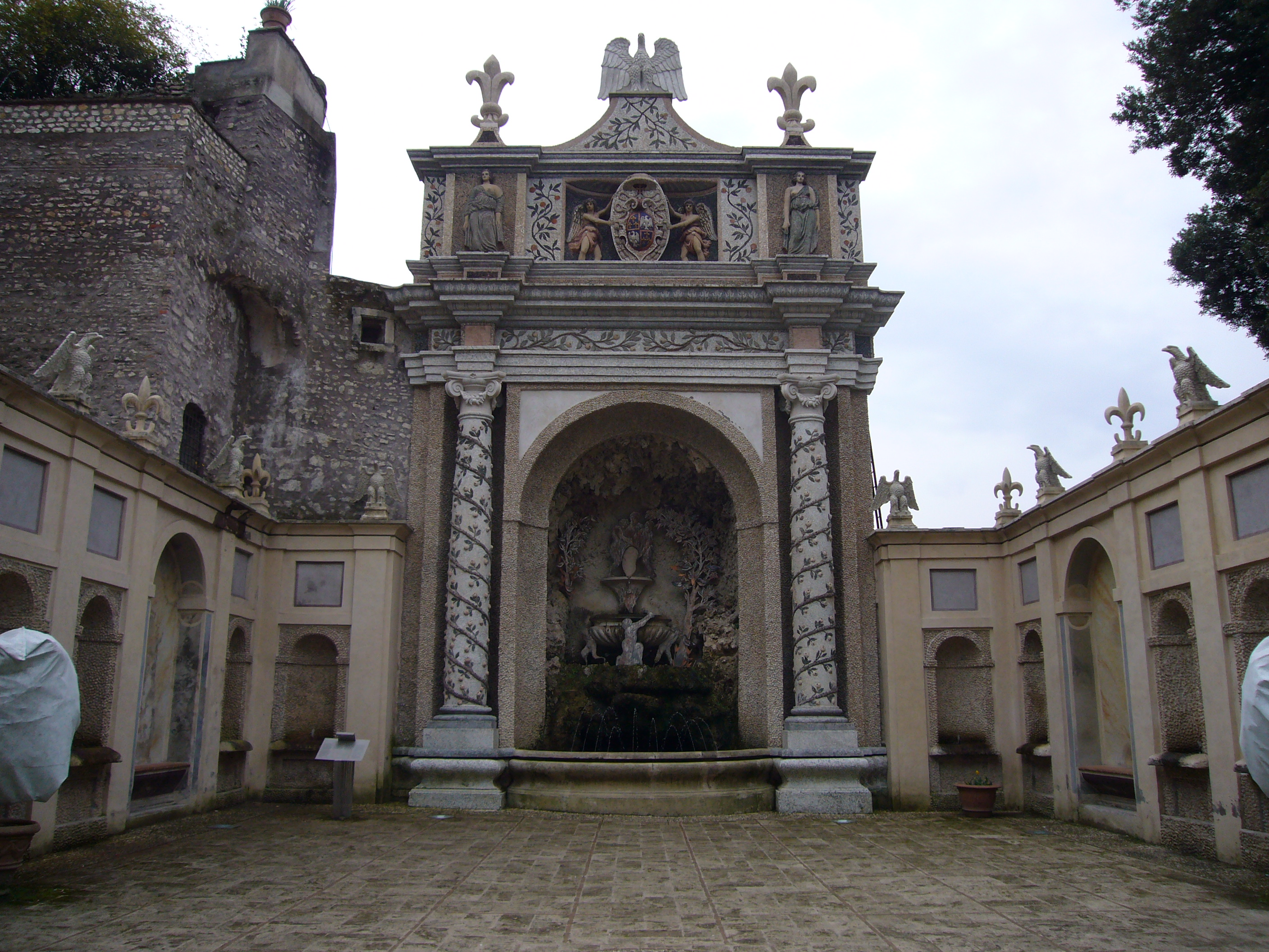 Tivoli, Villa d'Este: Fontana della Civetta